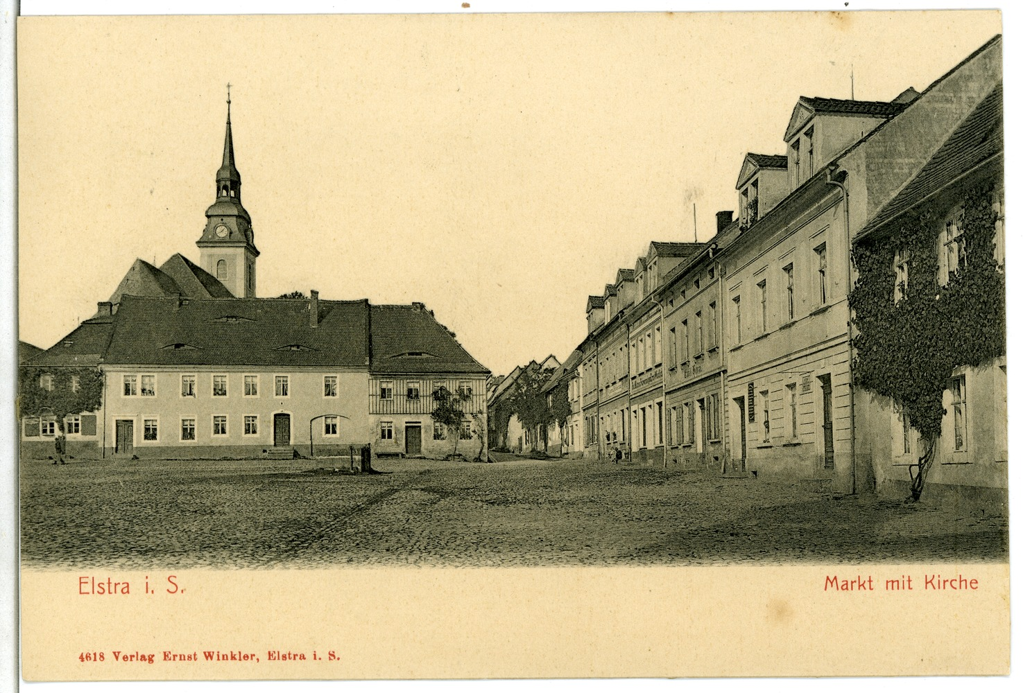 Elstra; Markt mit Kirche This postcard is from publisher Brück & Sohn in Meißen ( postcard has a unique number 04618 and is available in a higher resolution at the publisher. This images was uploaded in a cooperation project between Wikipedians and the publisher.